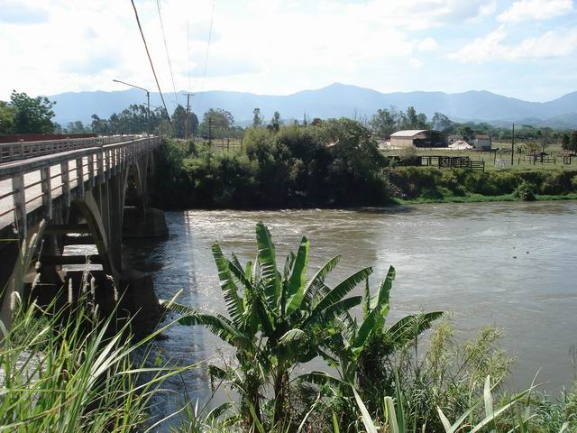 A esquerda, ponte sobre o Rio Paraiba do Sul